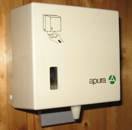 Seifenspender